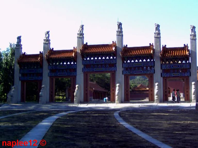 Jing Ling